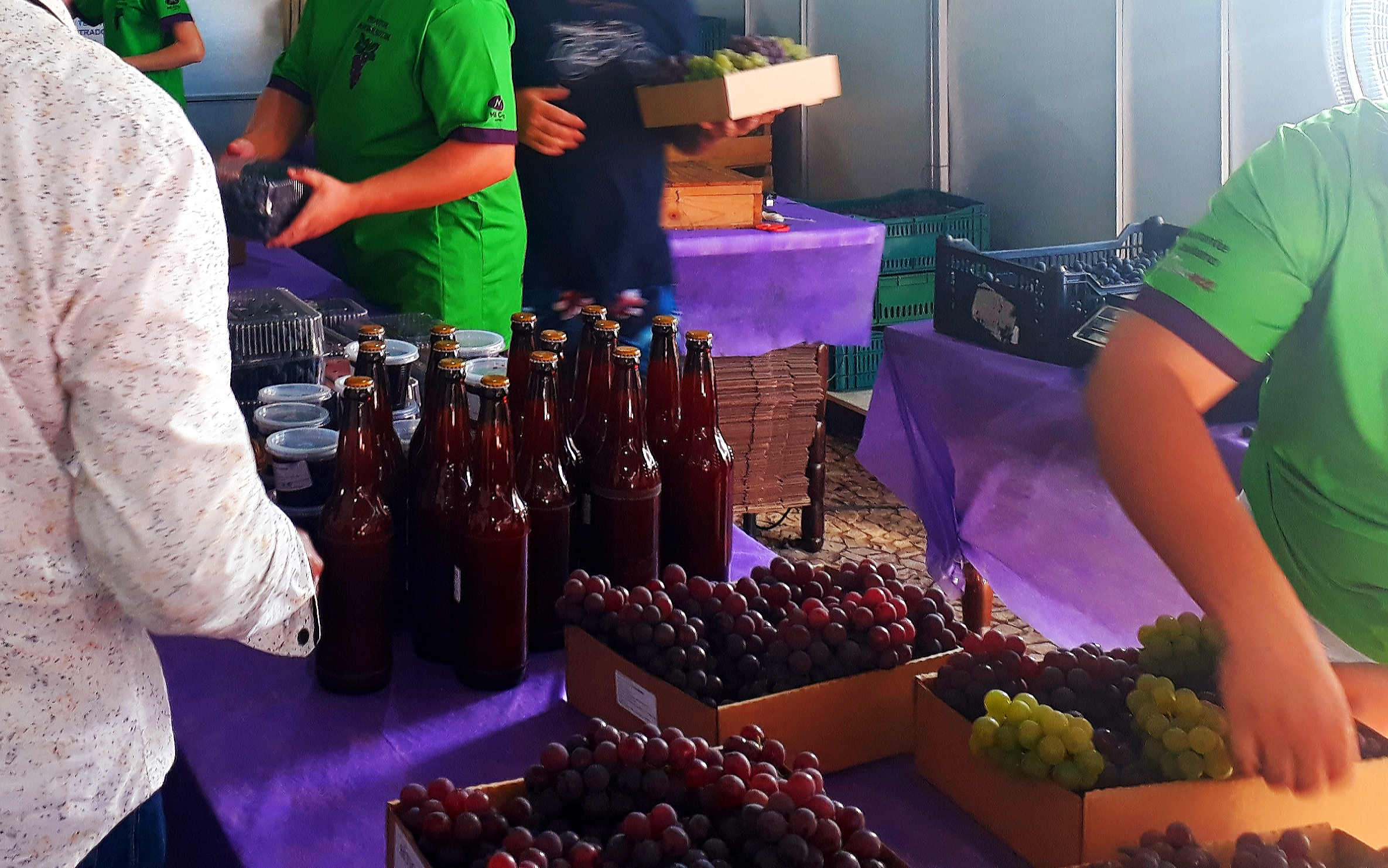 37° Festa da Uva em Ponta Grossa, no Paraná.